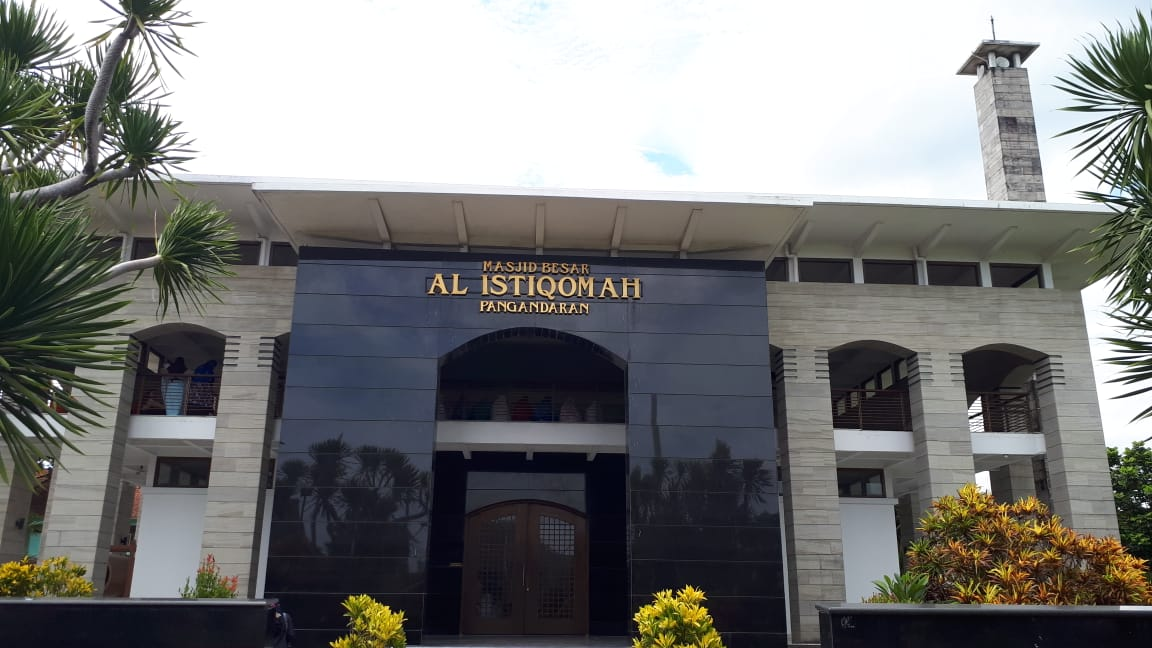 Sisi depan Masjid Besar Al-Istiqomah Pangandaran